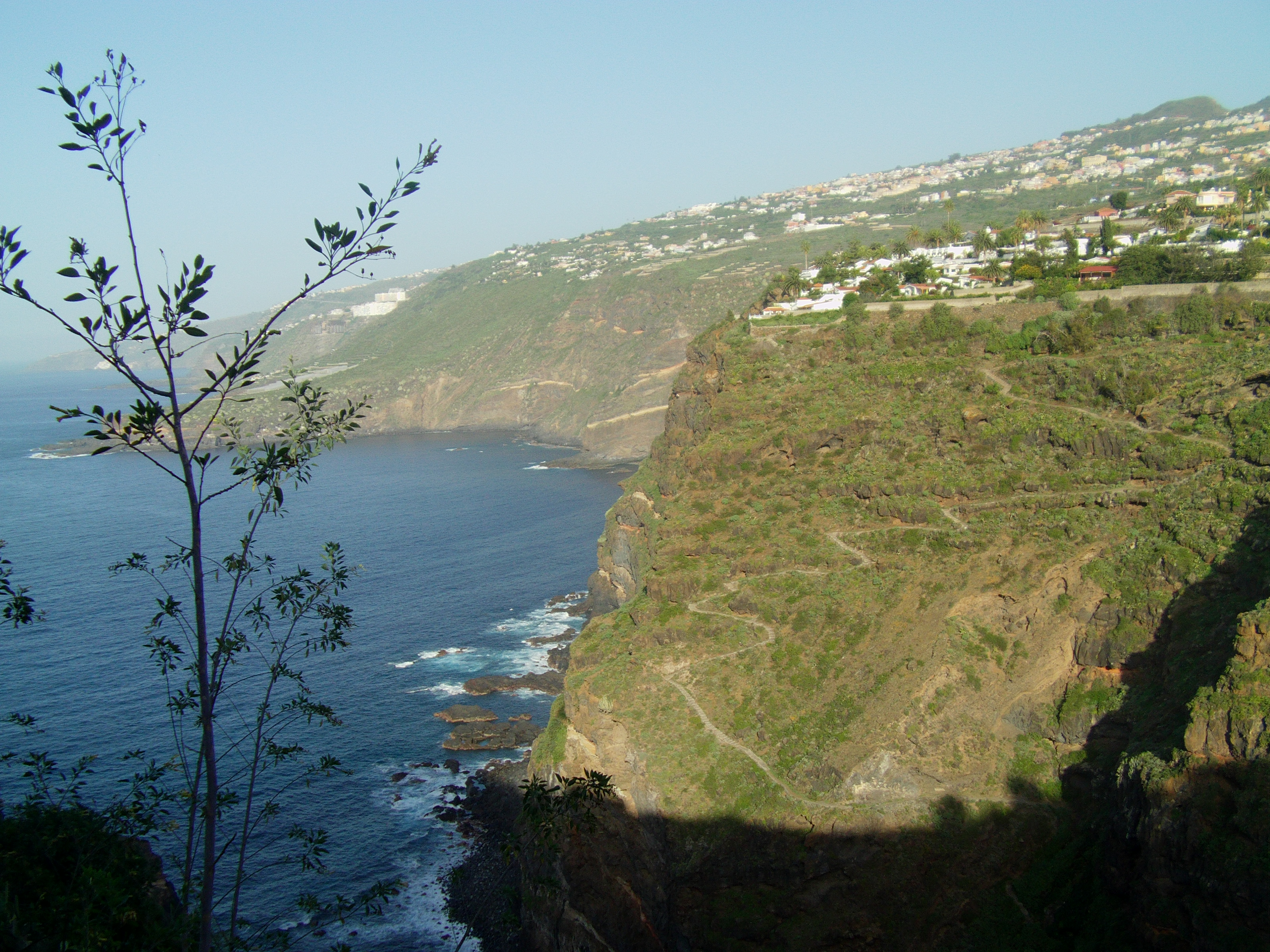 Vista de la costa del municipio de Santa Úrsula (Tenerife)